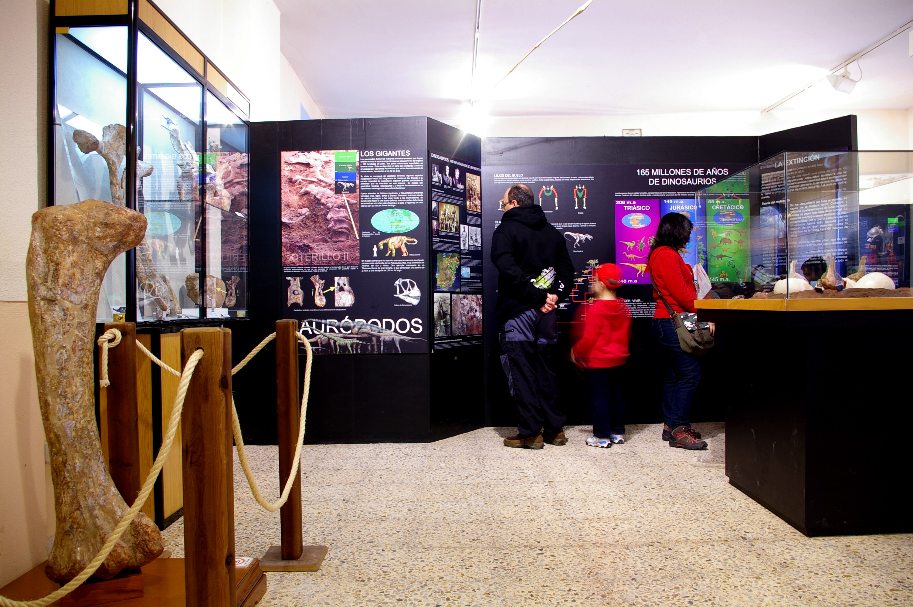 Detalle de la sala de paleontología